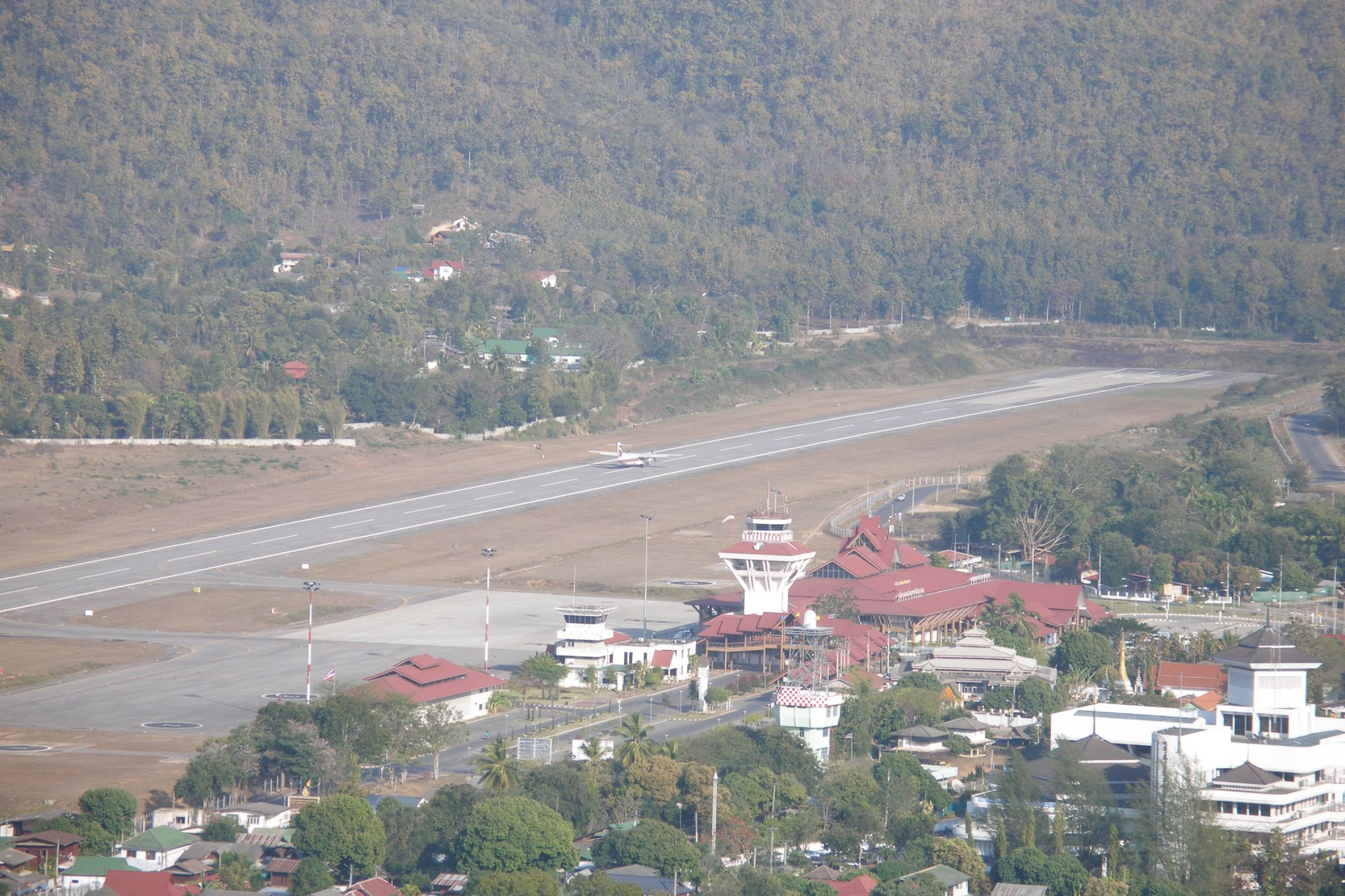 Flughafen Mae Hong Son